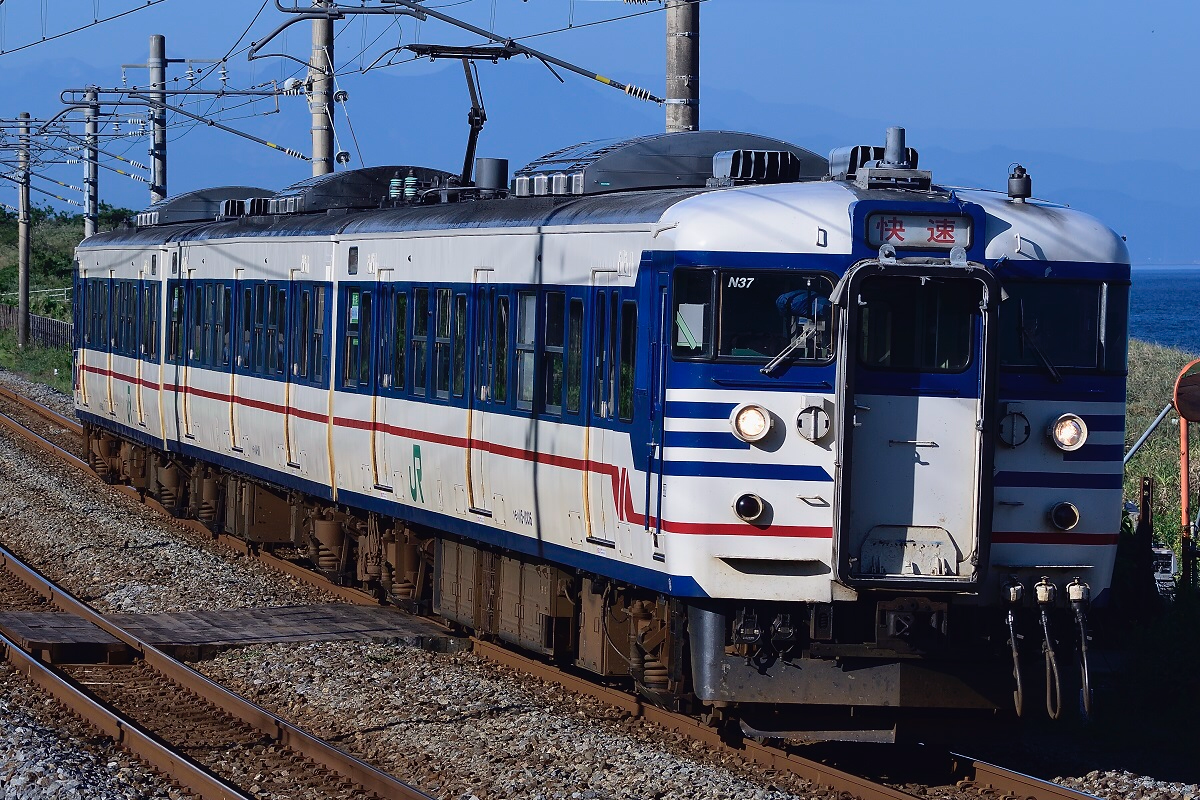 信越本線の快速列車